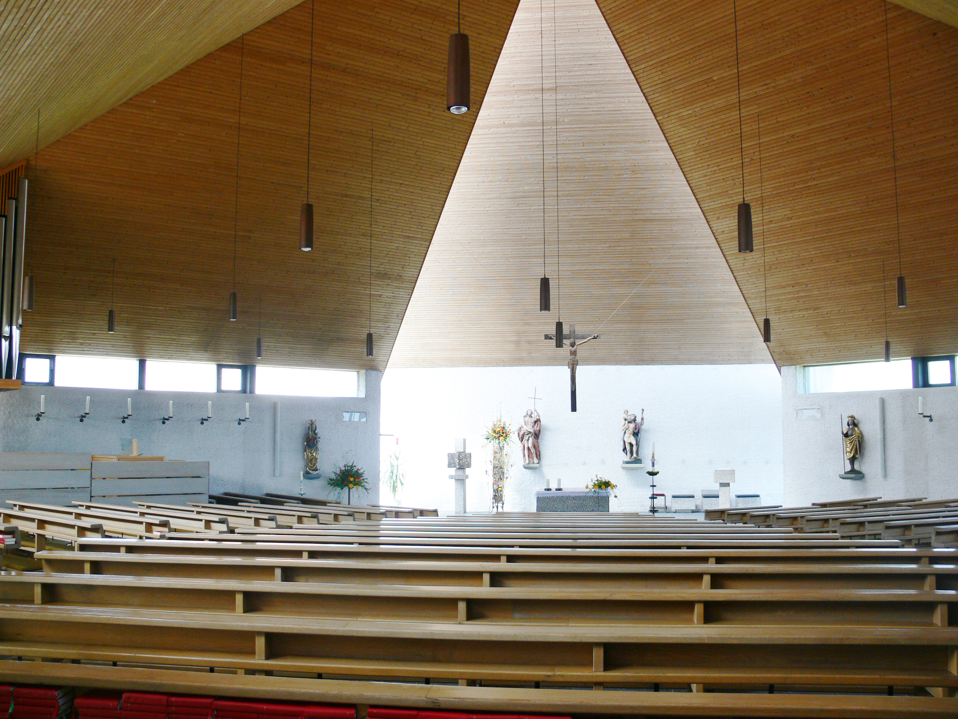 Pfarrkirche St. Gangolf, Kluftern (Stadt Friedrichshafen) Neue Kirche von 1974